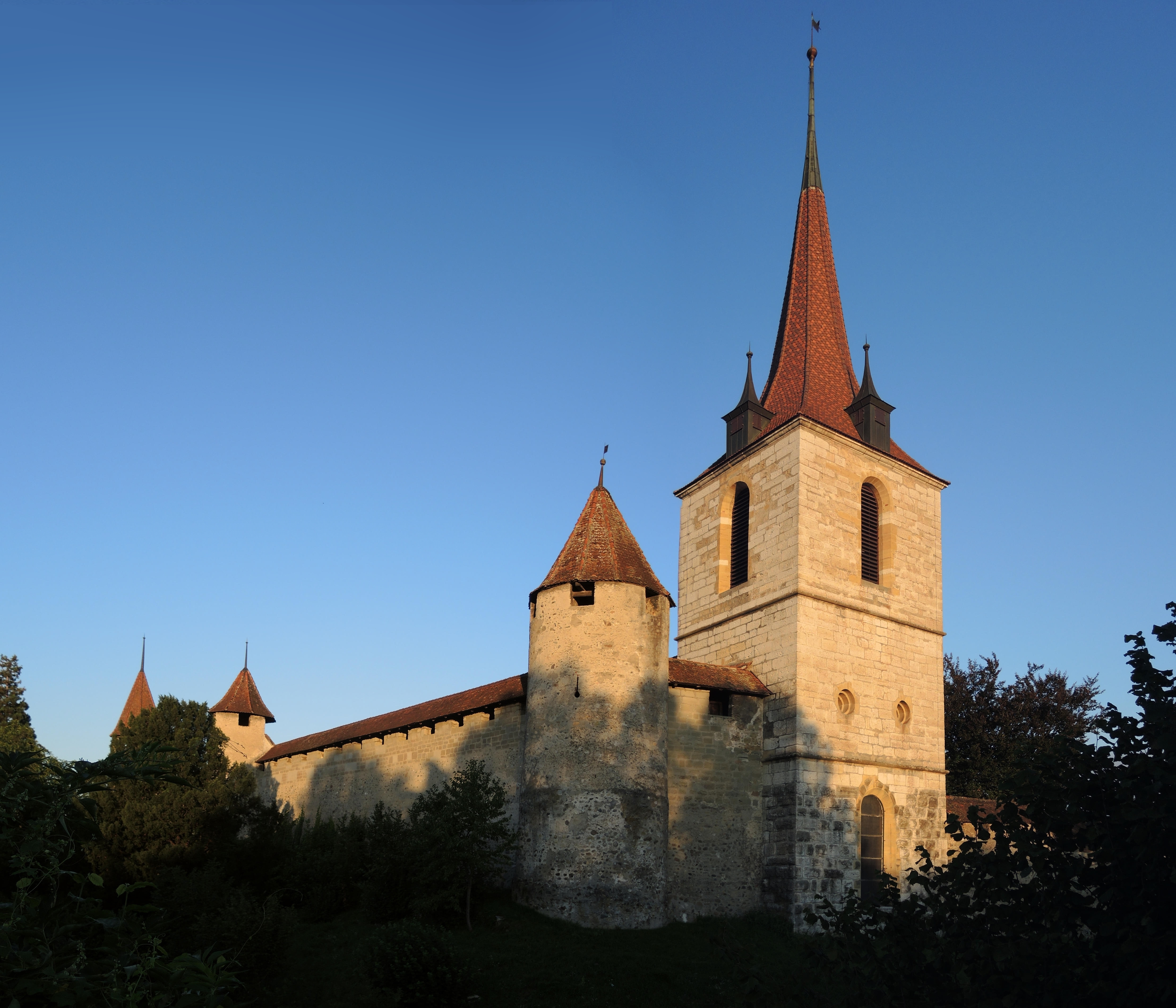 Murten, Switzerland